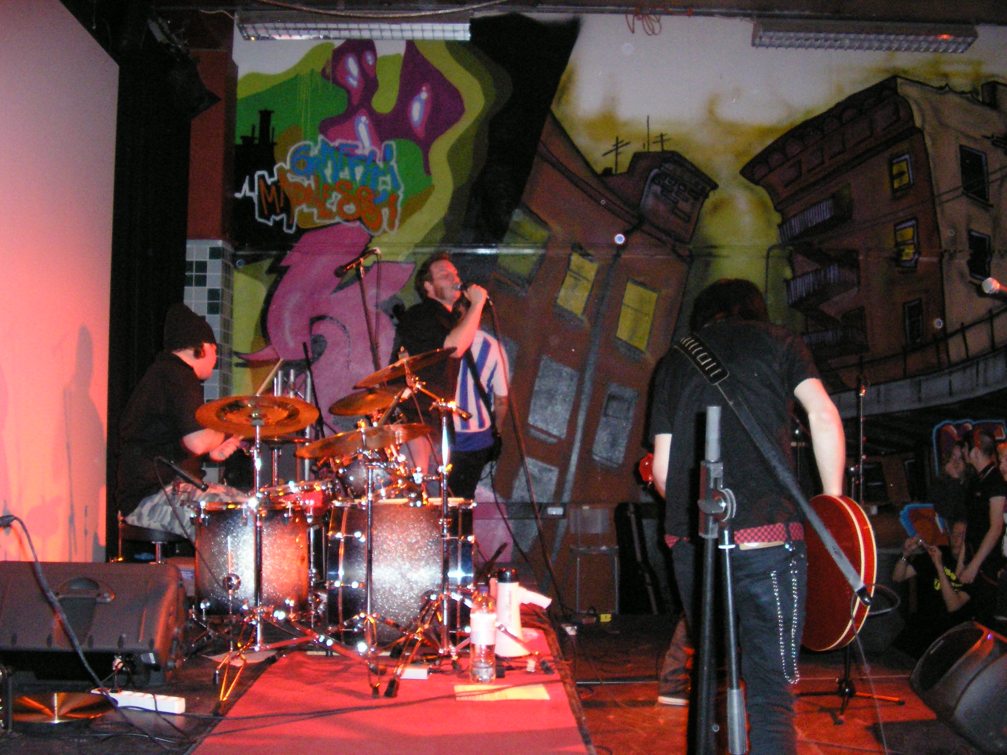 Sista Skriket playing at Hus1 in Jakobsberg